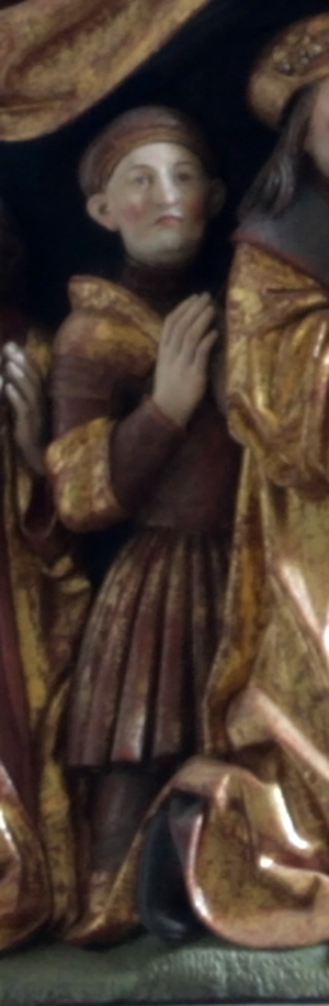 Darstellung des Ritters Florian Waldauf unter dem Mantel der Frauensteiner Schutzmantelmadonna (nach 1510)